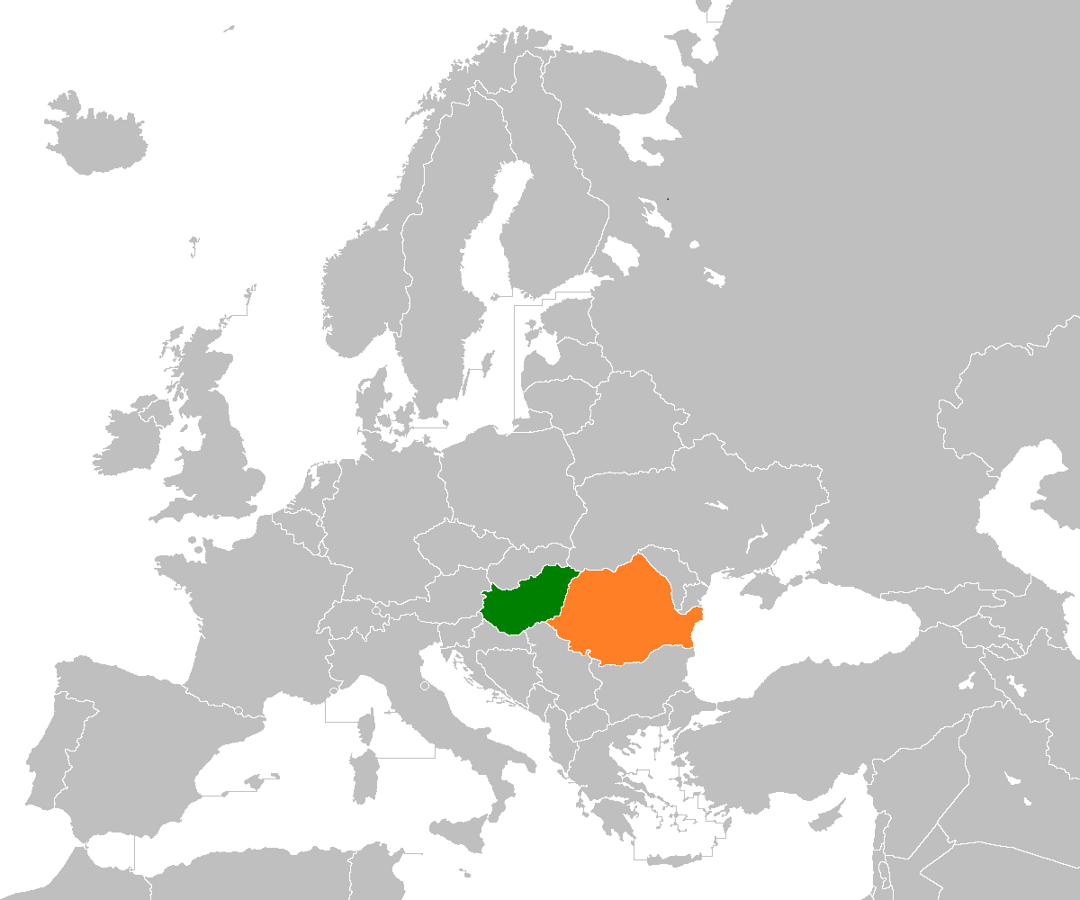 Hungary-Romania locator map.